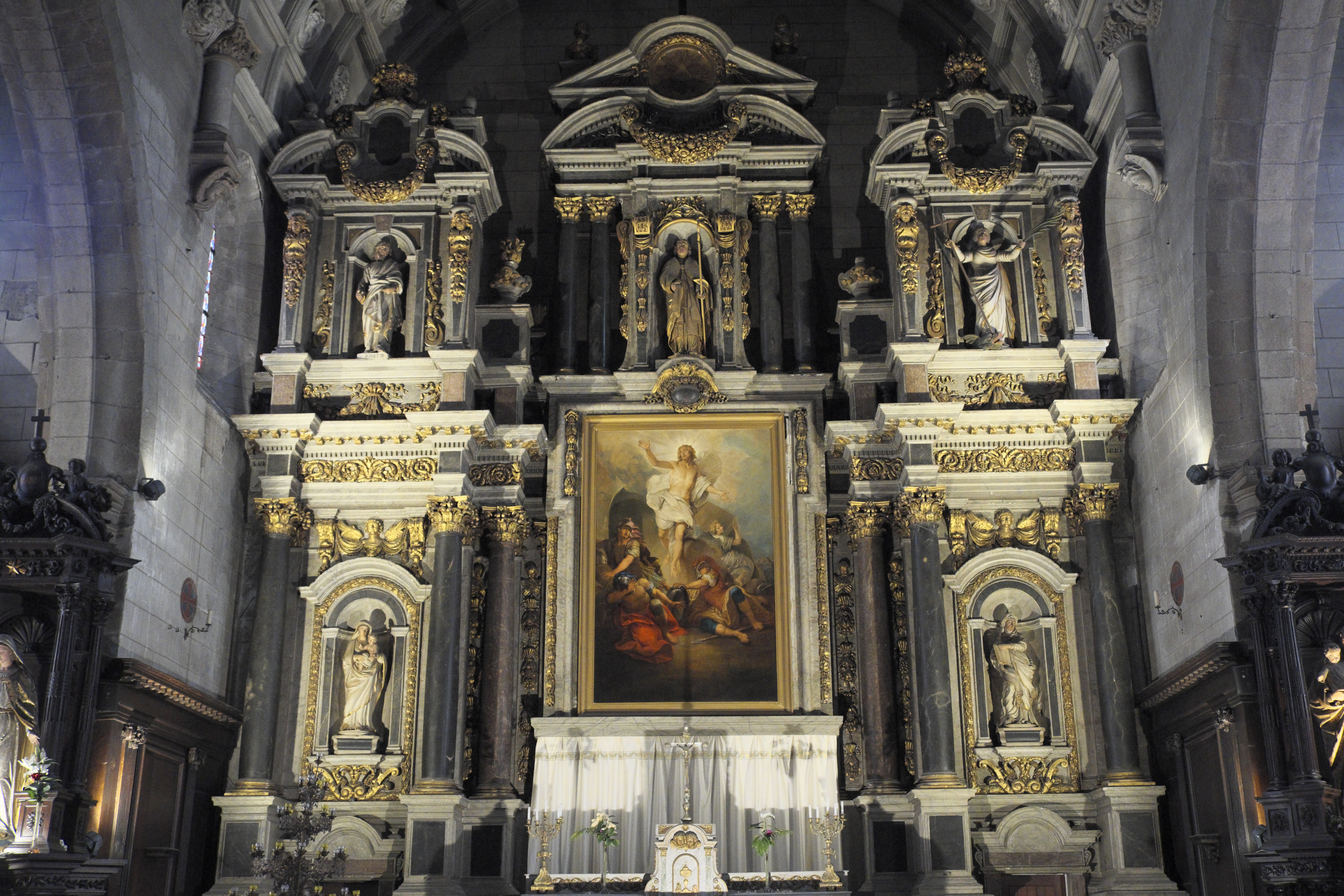 Katholische Pfarrkirche Saint-Gildas in Auray im Département Morbihan (Region Bretagne/Frankreich), Hauptaltar